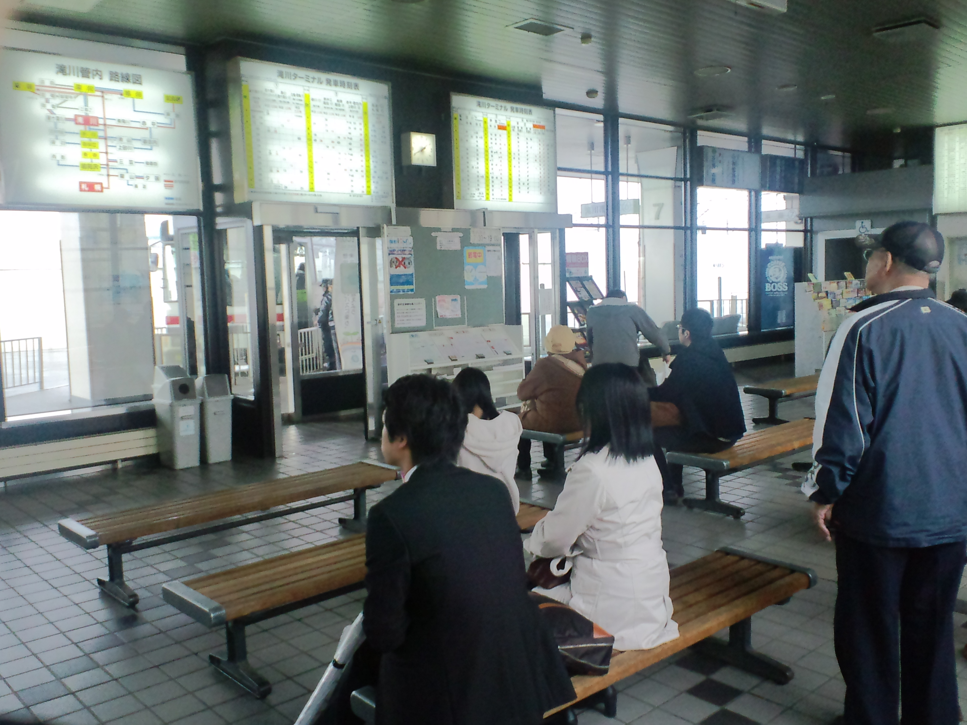 滝川ターミナル待合室